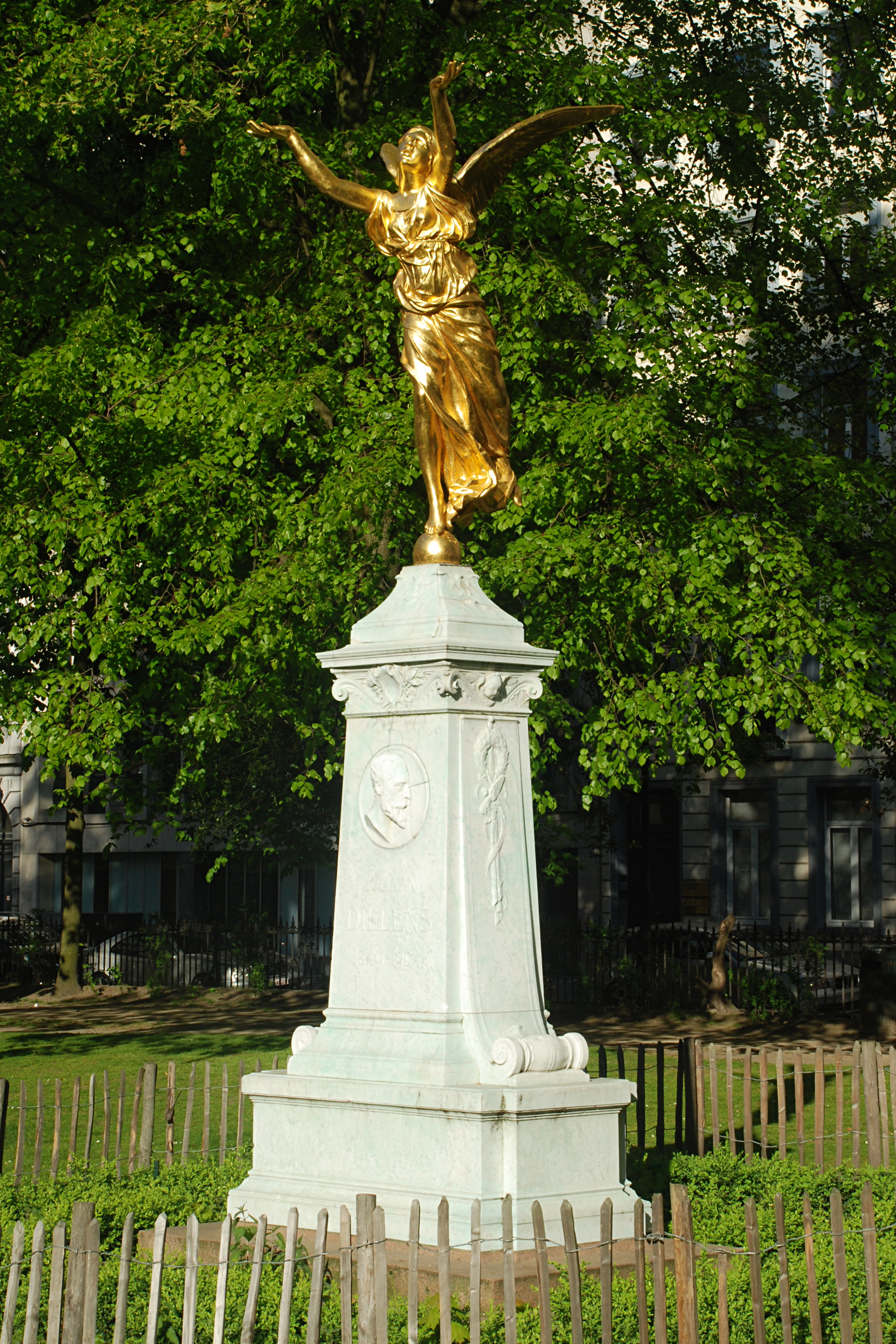 Belgique - Bruxelles - Monument Julien Dillens